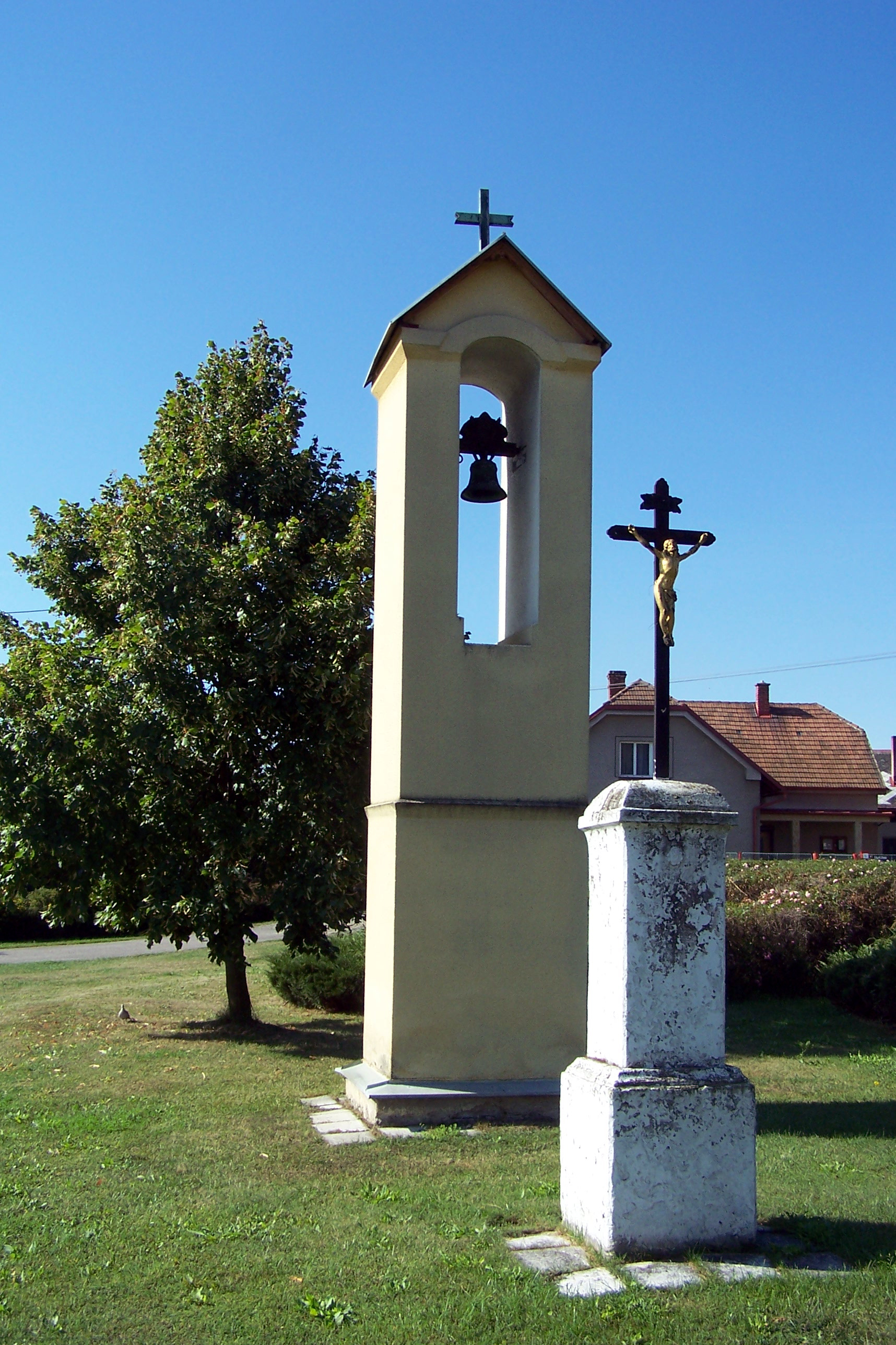 Valy nad Labem - zvonička a křížek před obecním úřadem.